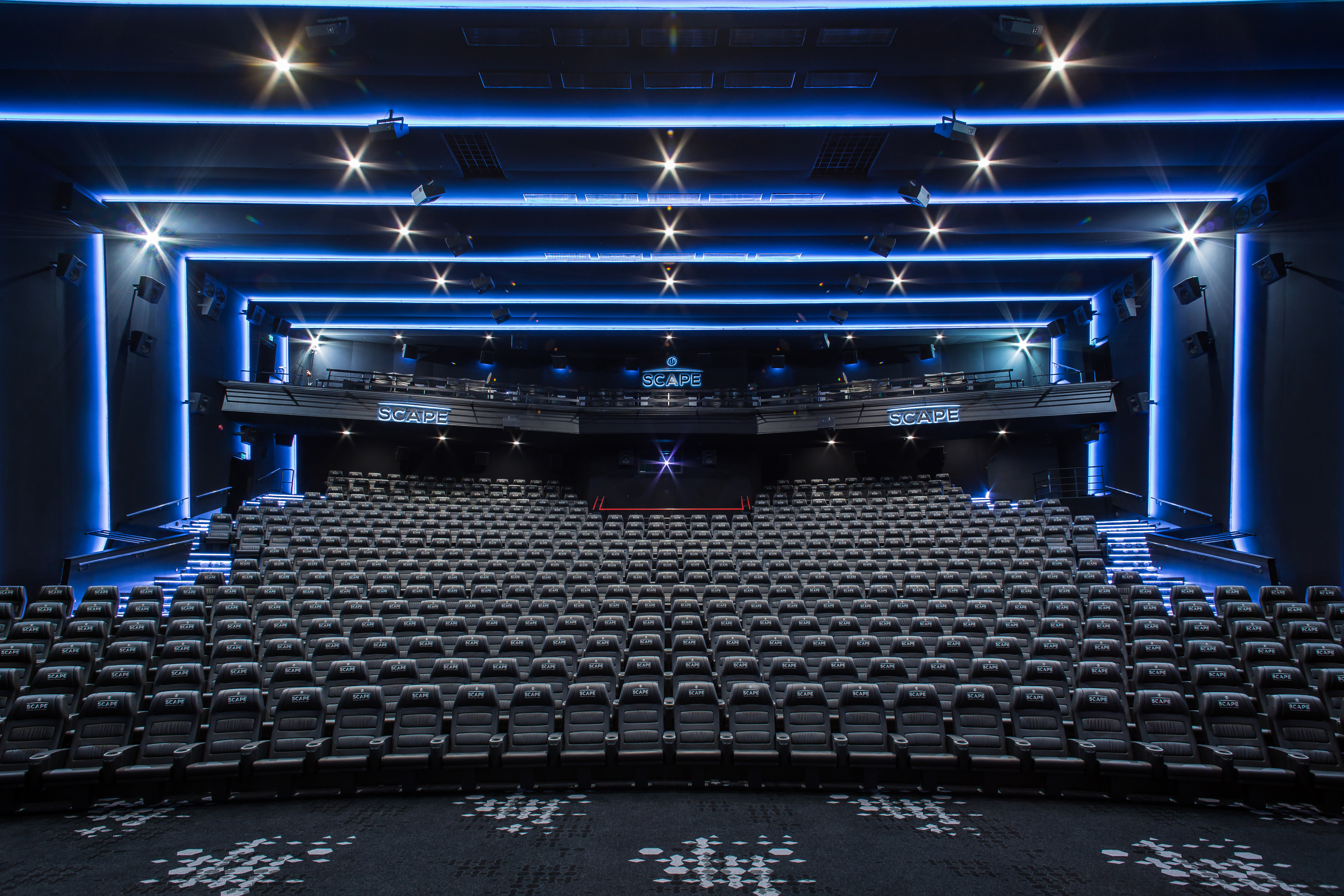 SCAPE auditorija kinoteātrī "Kino Citadele"